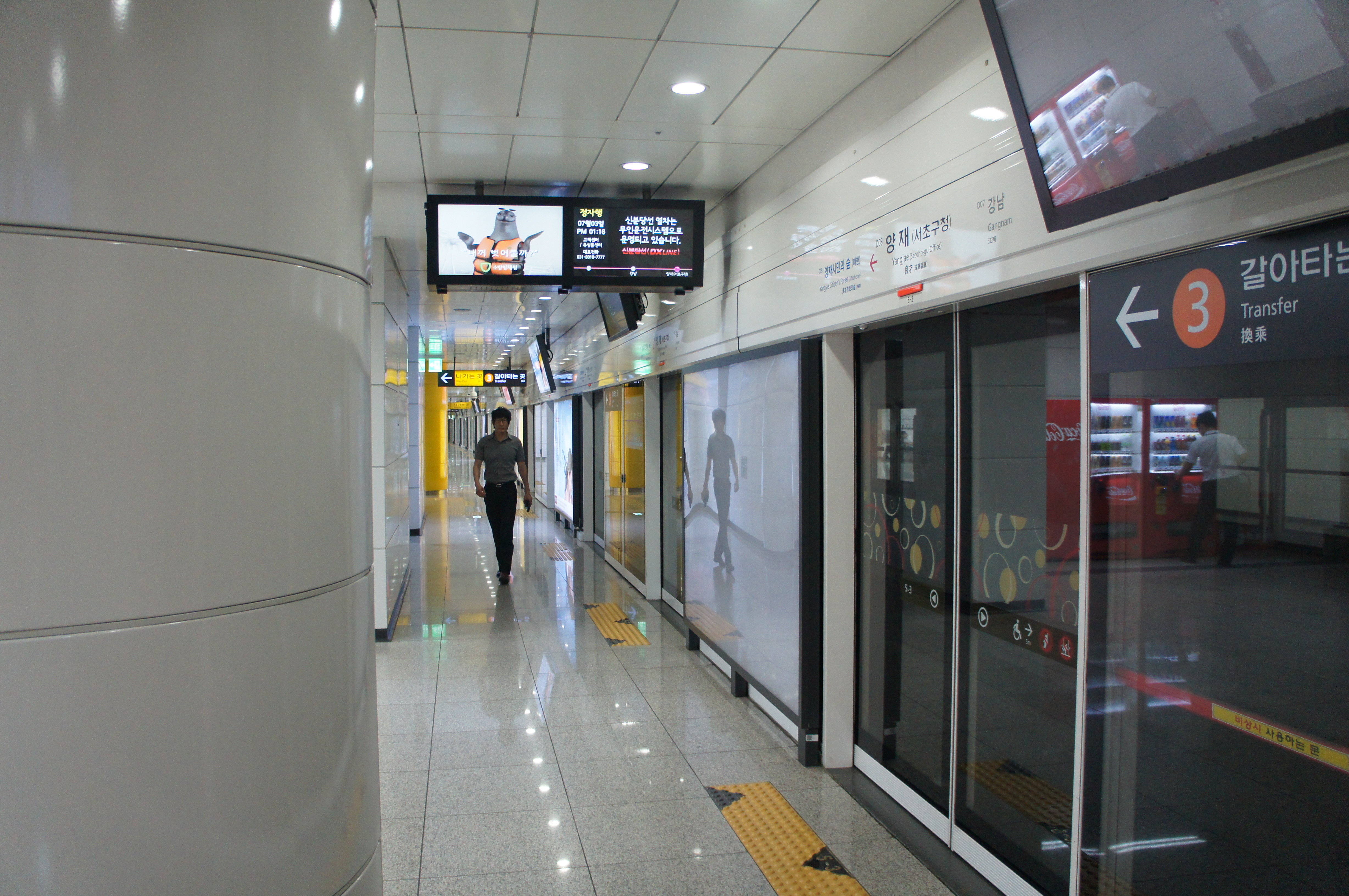 신분당선 양재역 승강장